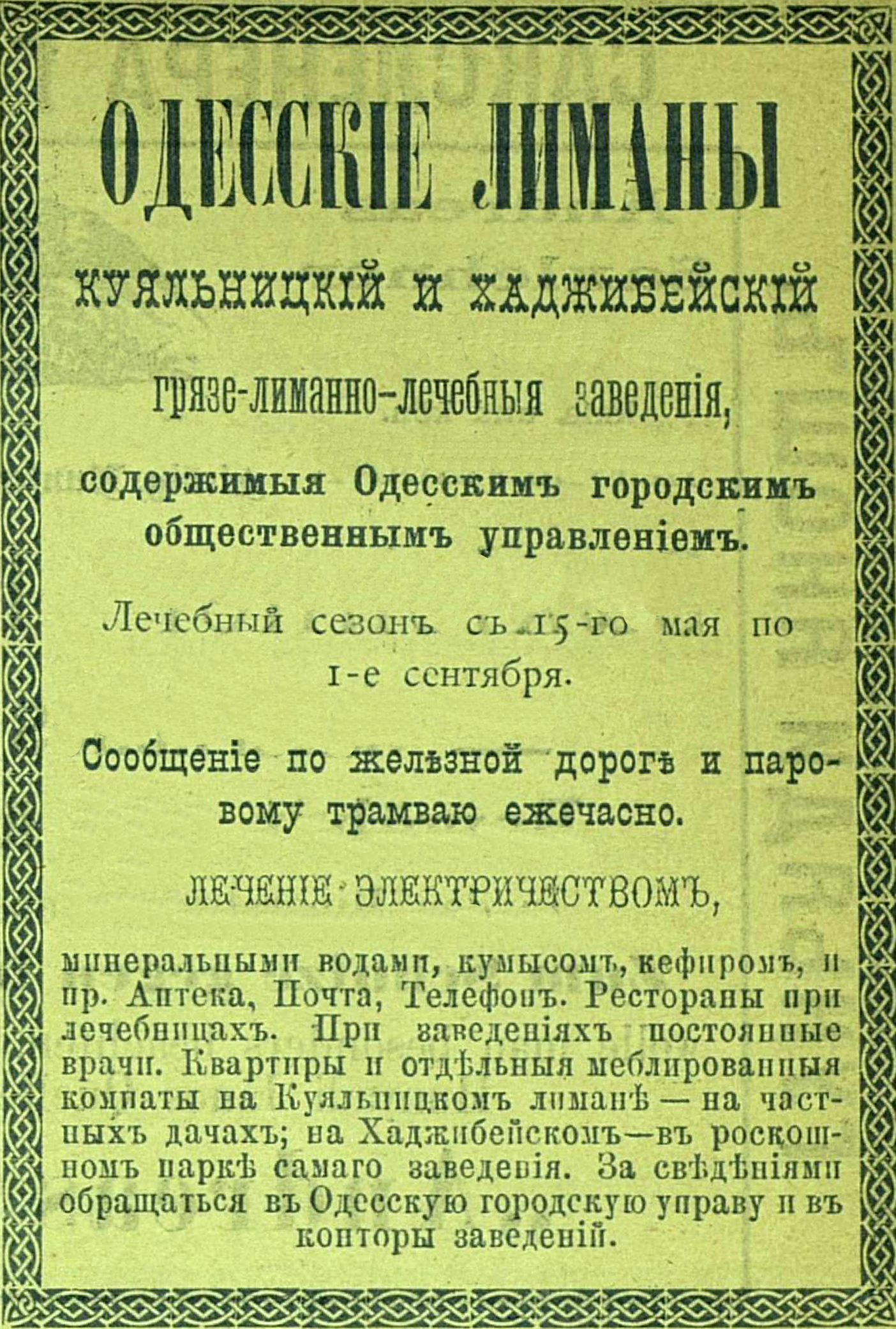 Реклама лечебных заведений на одесских лиманах, 1895 год.